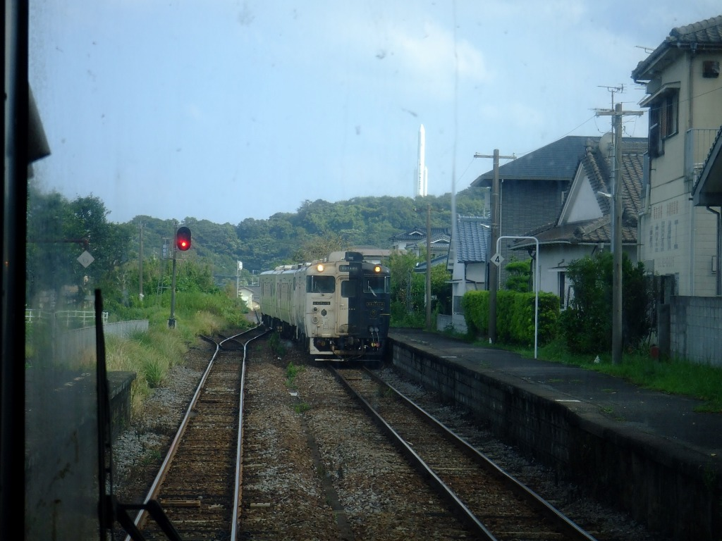 五位野駅を通過しようとする鹿児島中央行き特急列車